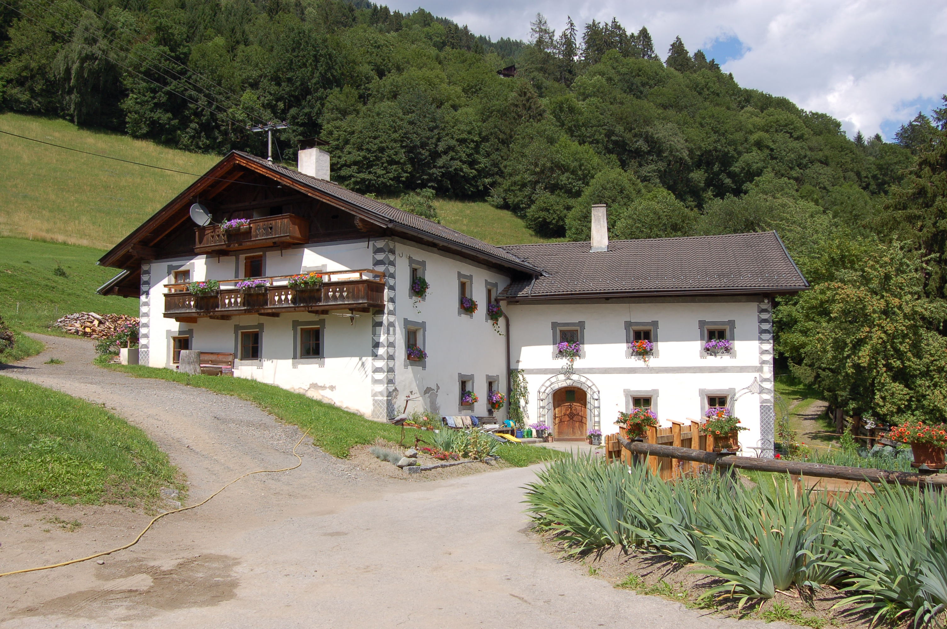 Der denkmalgeschützte Bauernhof Fasching in Nußdorf-Debant ist ein Paarhof mit Harpfe und Bildstock südöstlich des Dorfzentrums, wobei das Wohnhaus aus einem spätgotischen Bauteil aus dem 16. Jahrhundert und einem rechtwinkeligem Anbau aus dem 18. Jahrhundert besteht. Nördlich steht zudem eine dreiteilige Doppelharpfe mit Satteldach aus dem Jahr 1819, das Wirtschaftsgebäude stammt aus der ersten Hälfte des 20. Jahrhunderts.